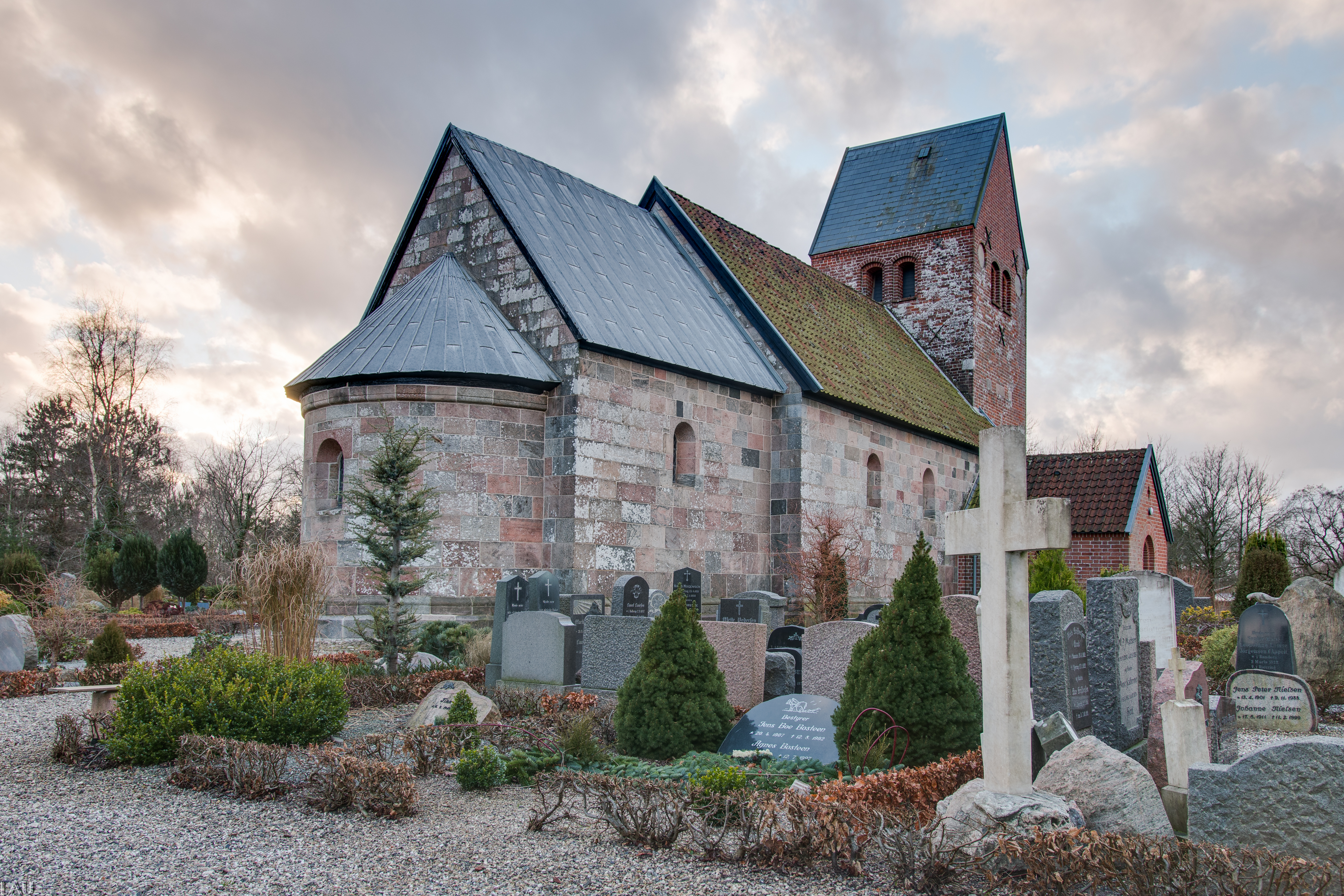 Bjerring Kirke